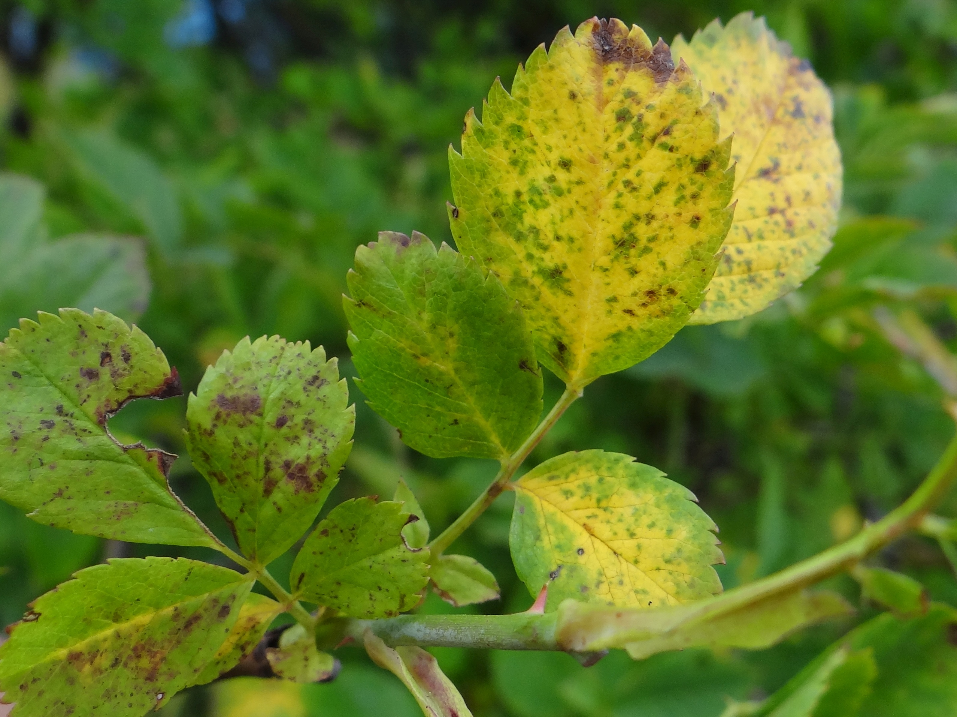 Peronospora sparsa on Rosa canina